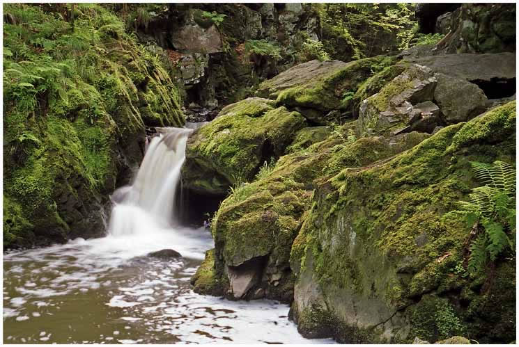 PR Údolí Doubravy - vodopád